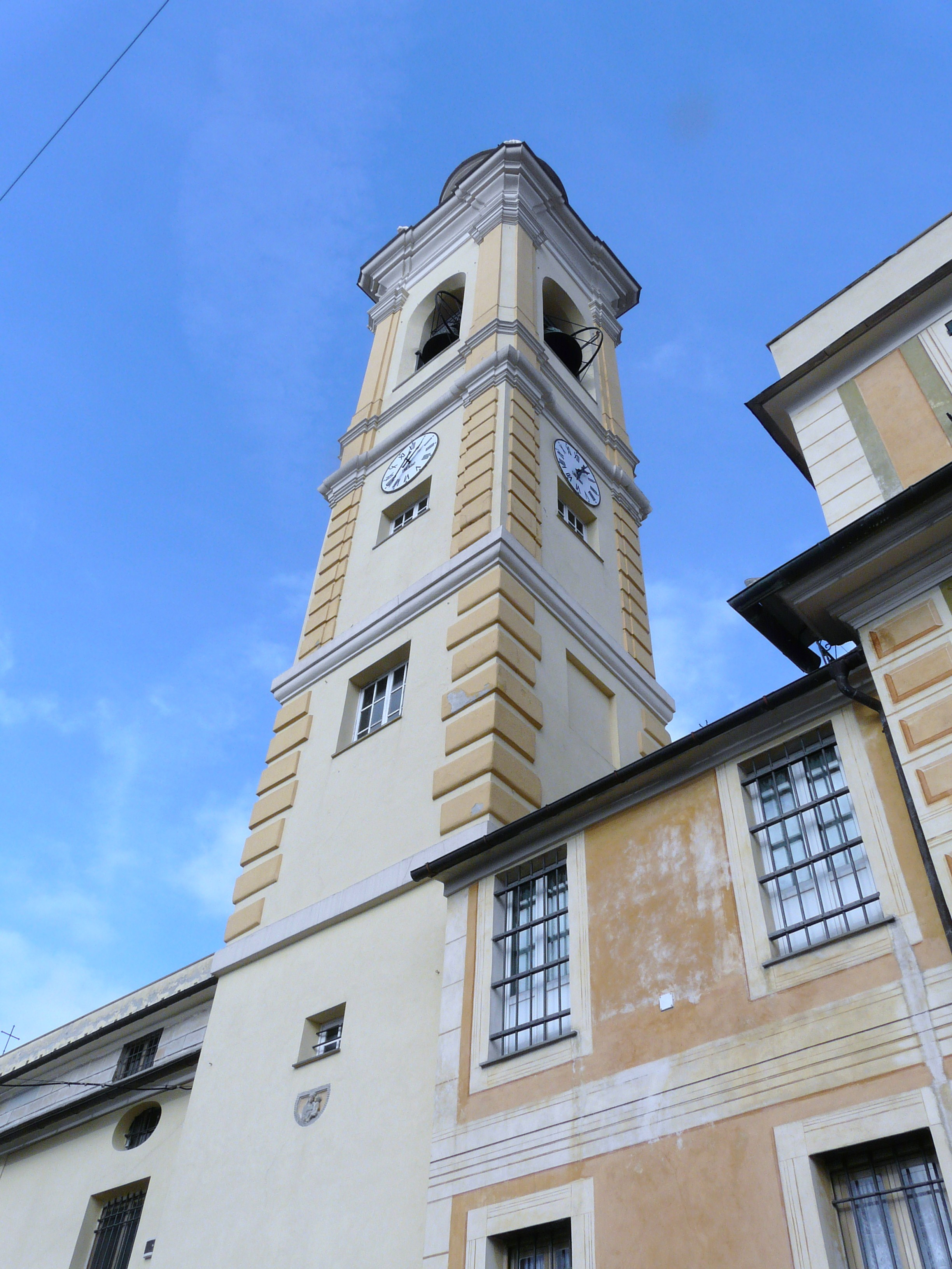 Campanile della chiesa di Santa Maria Assunta, Apparizione, Genova, Liguria, Italia